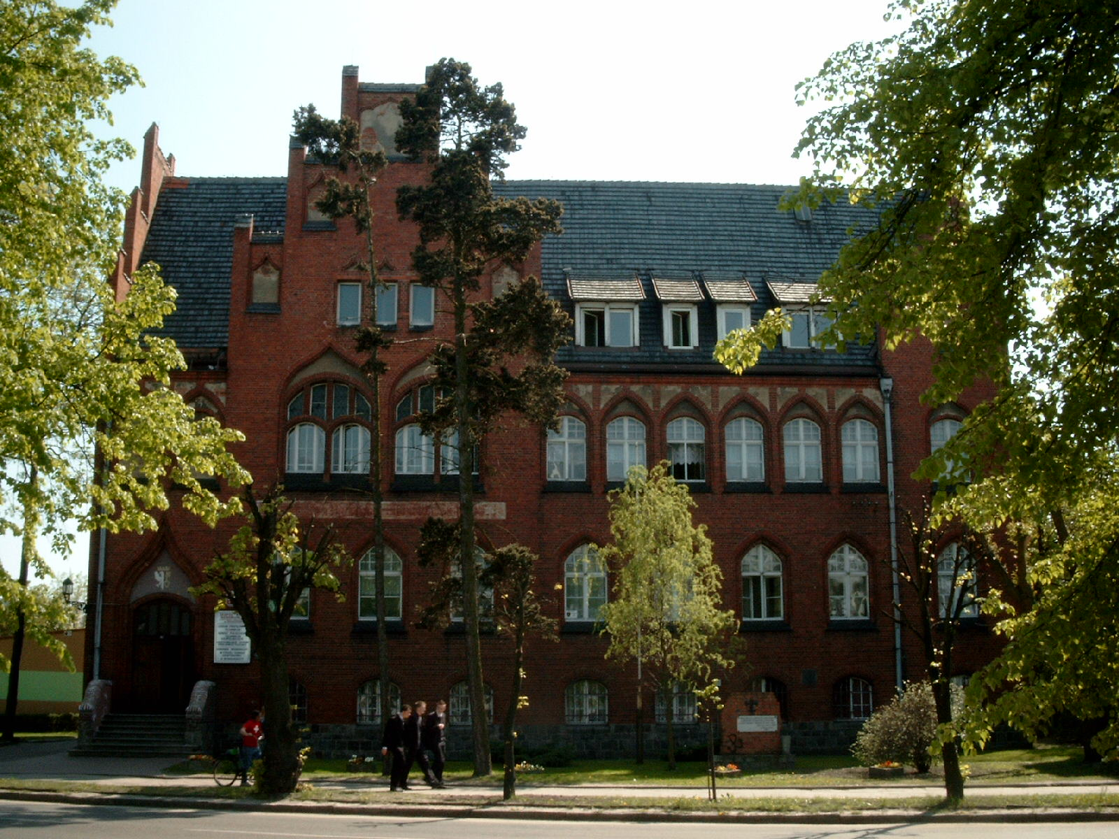 Agro-business High School of Rogoźno